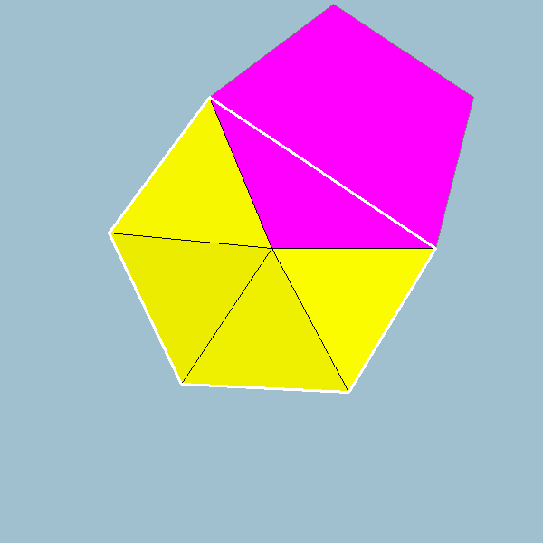 Vertex figure for polyhedron